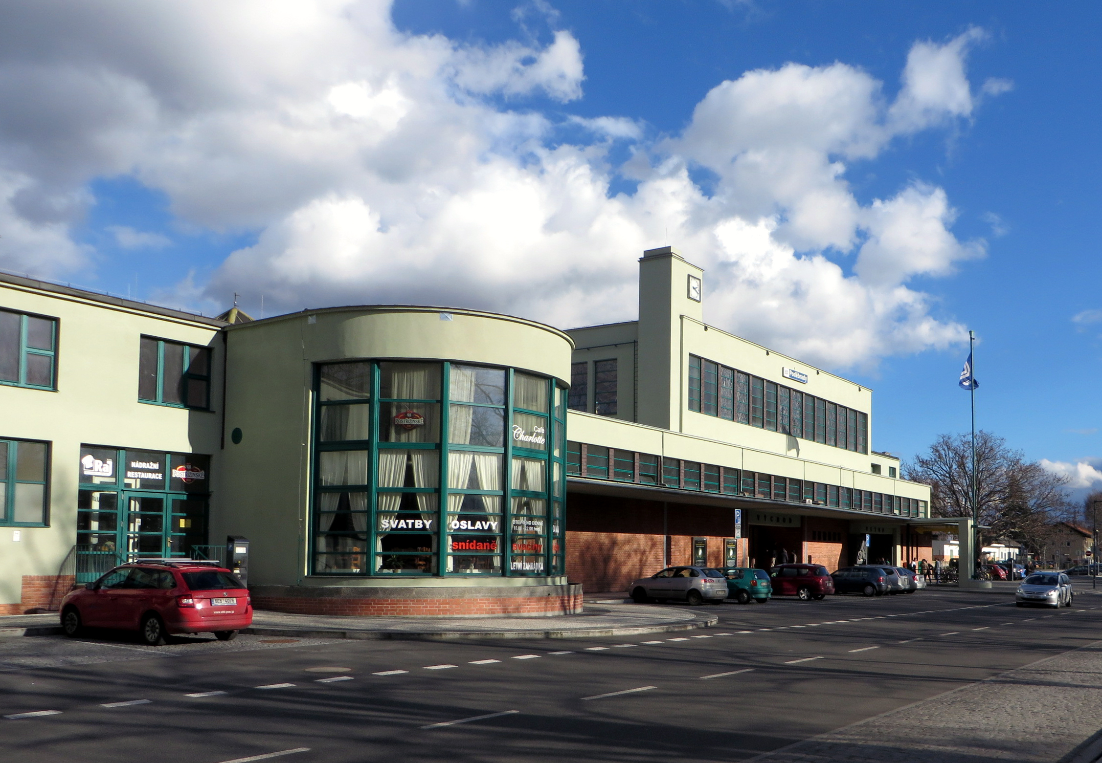 Železniční stanice Poděbrady po rekonstrukci.